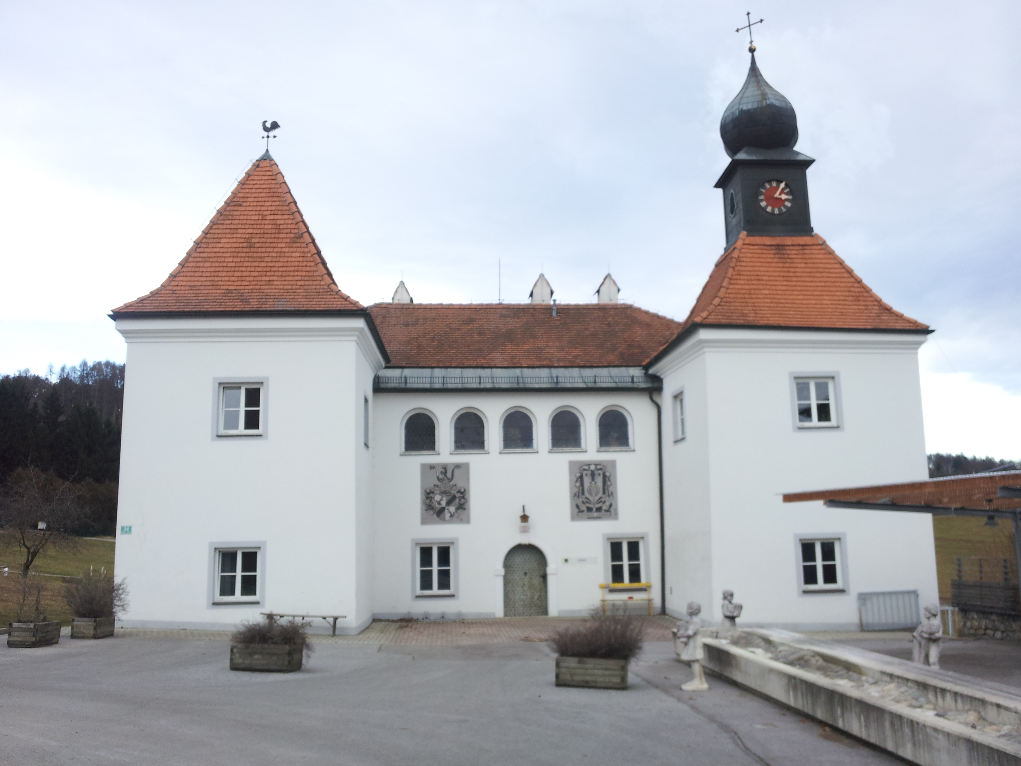 Schloss Kainbach - Frontalansicht